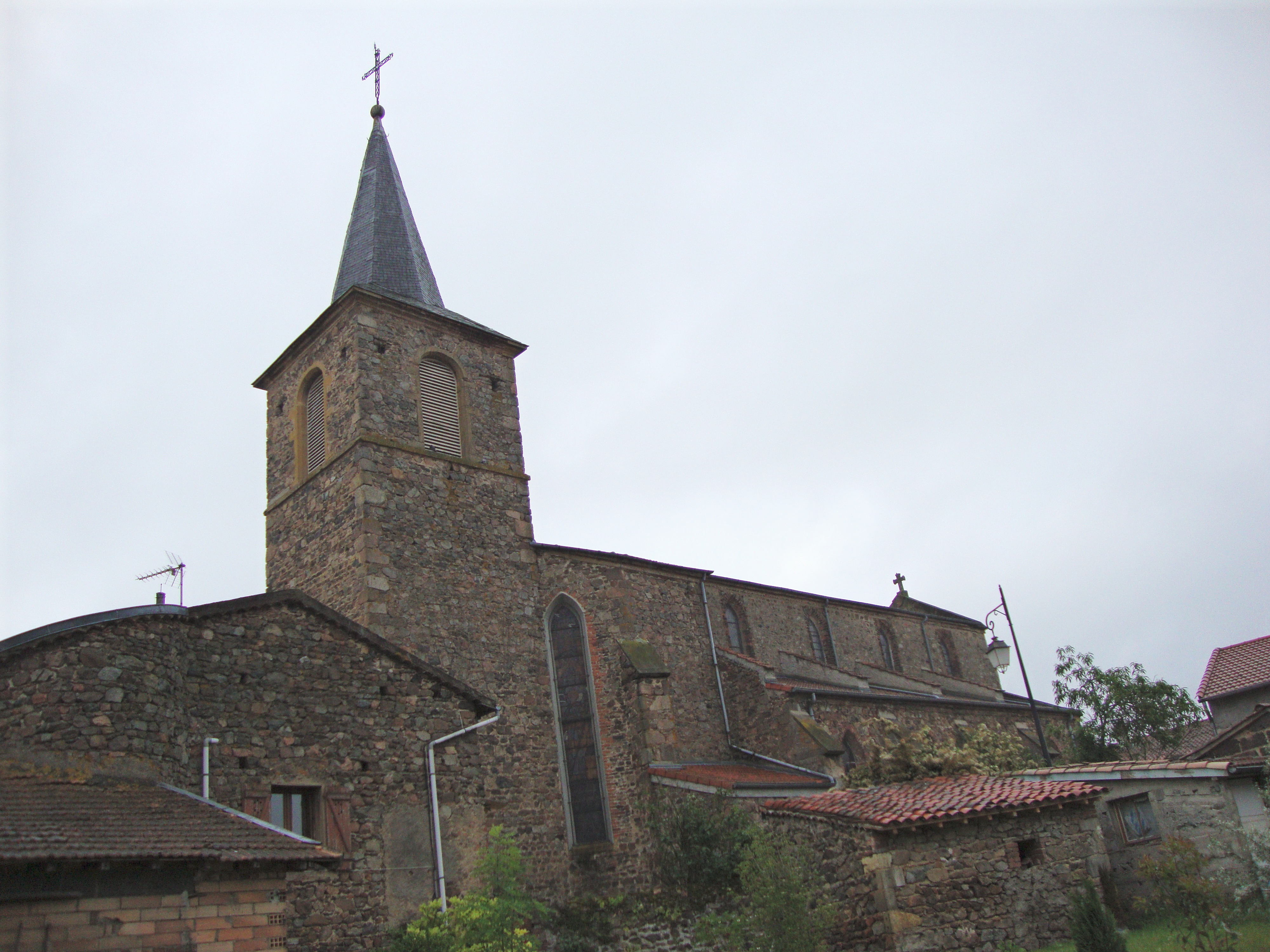 Pinay (Loire, Fr) église coté tour